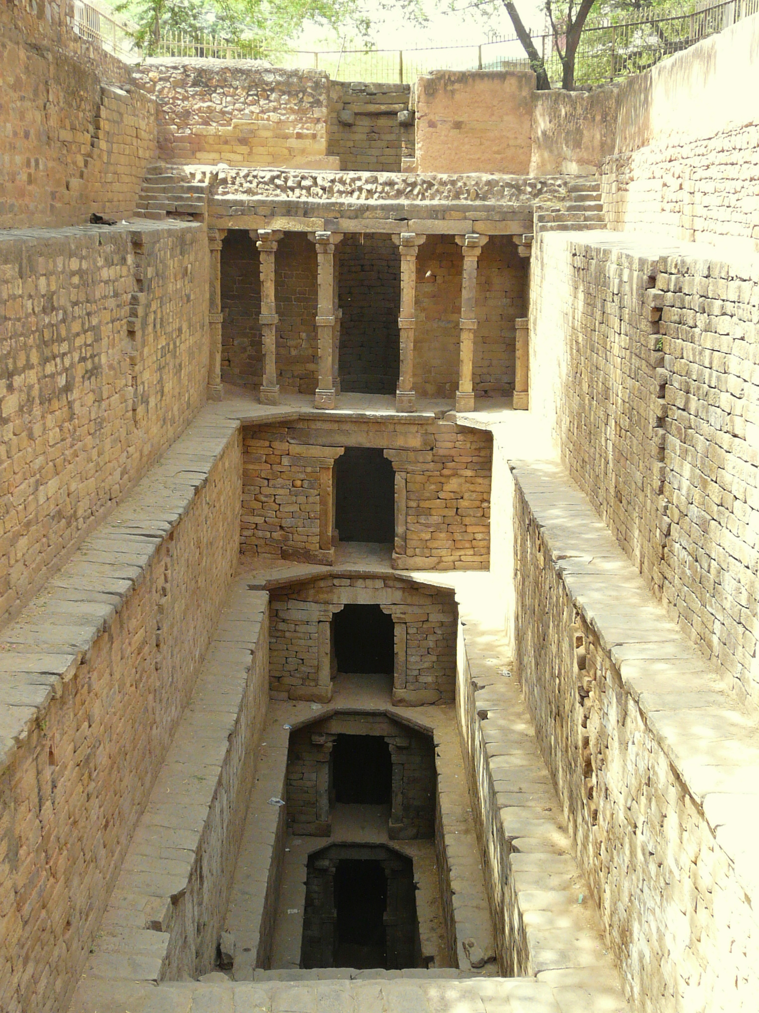 Gandhak ki Baoli, Mehrauli, built by Sultan of Delhi, Iltutmish for Sufi saint Qutbuddin Bakhtiar Kaki.